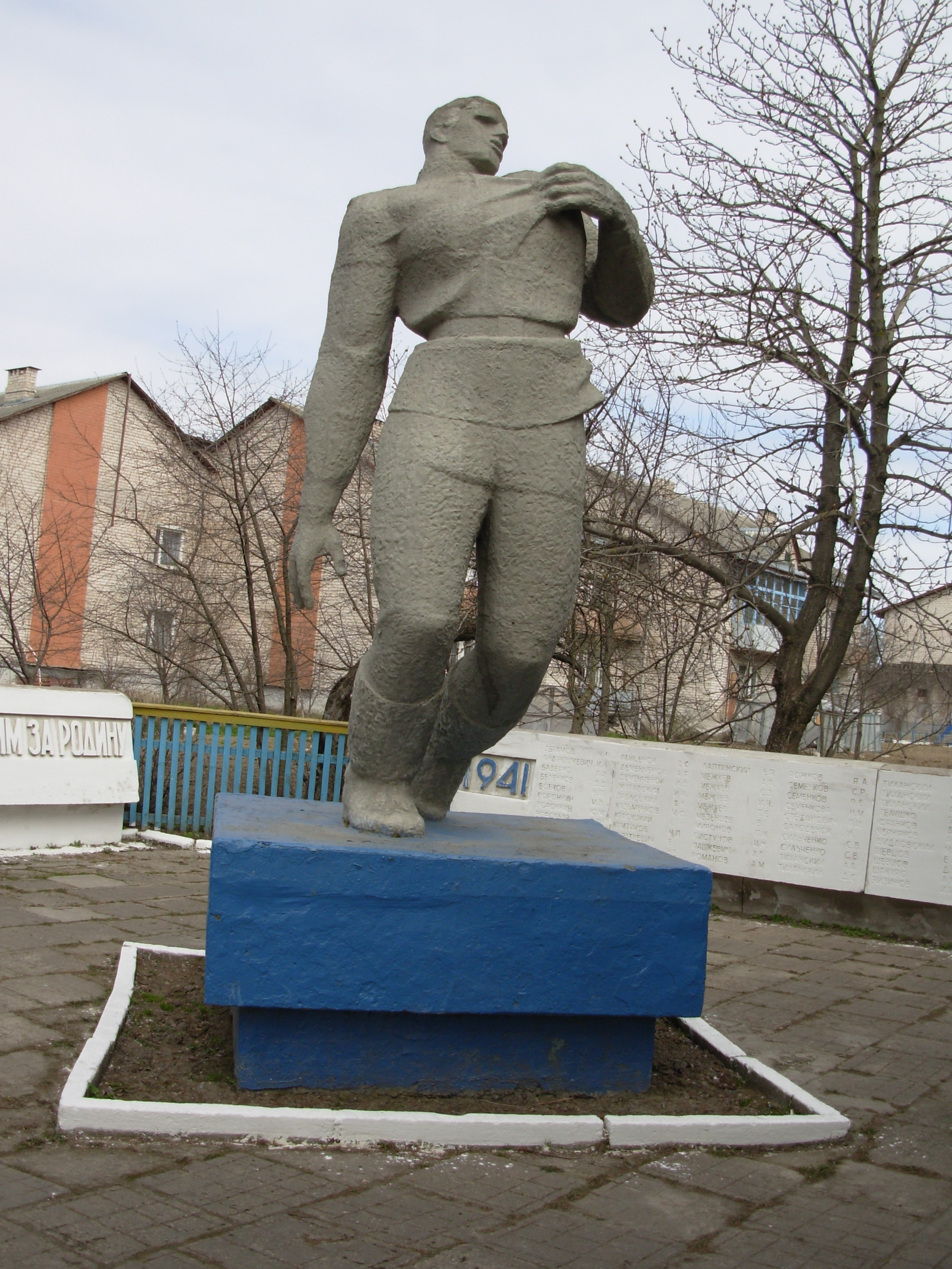 Беларуская (тарашкевіца): Помнік загінулым землякам